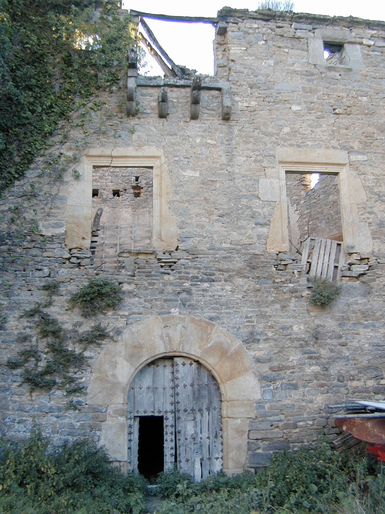 Fachada principal del palacio en ruinas, actualemente esta en reconstrucción